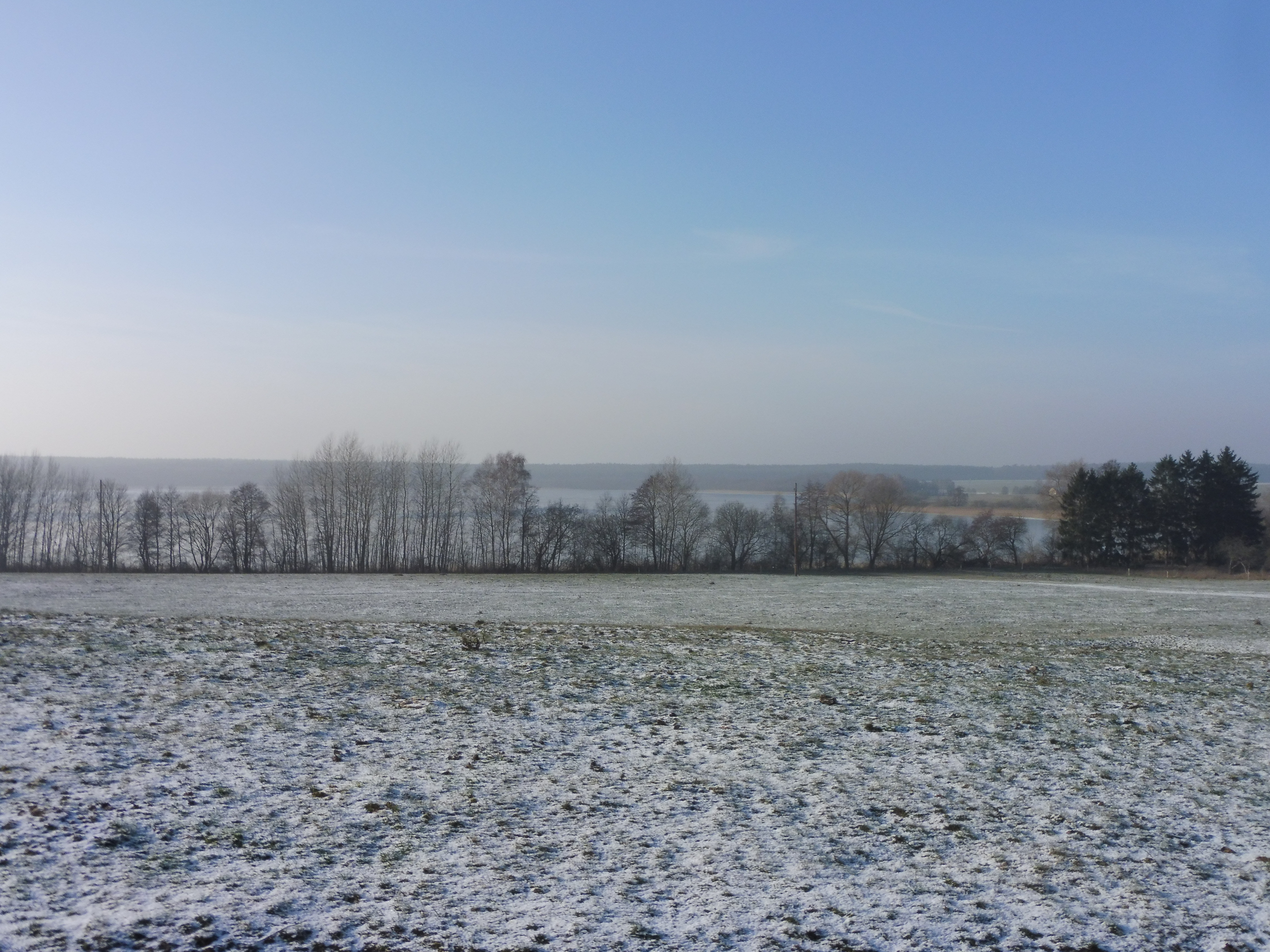 Malkwitzer See südlich von Cramon in Mecklenburg, fotografiert von Kniep in westlicher Richtung